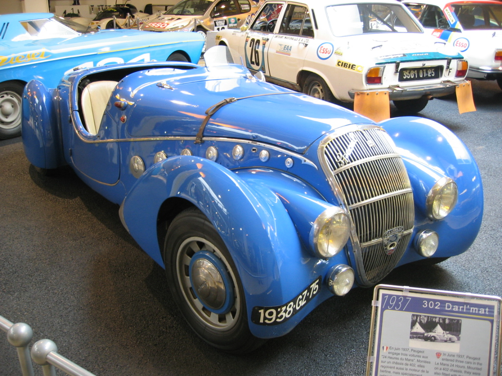 Peugeot 302 Darl'mat - Musée Peugeot Sochaux